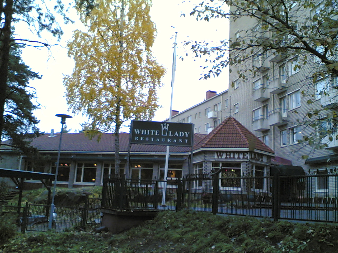 White Lady Restaurant Mannerheimintie 93, 00270 Helsinki.